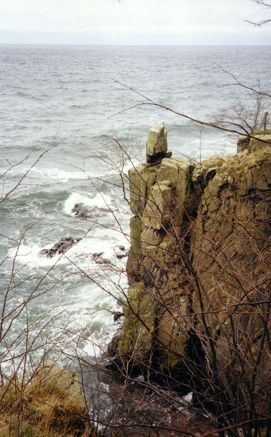 Felsen bei Jons Kapel originally uploaded on de.wikipedia by Benutzer:Darkone at 23:46, 7. Nov 2004. Filename was Jons Capel bei Teglkas 1.jpg.